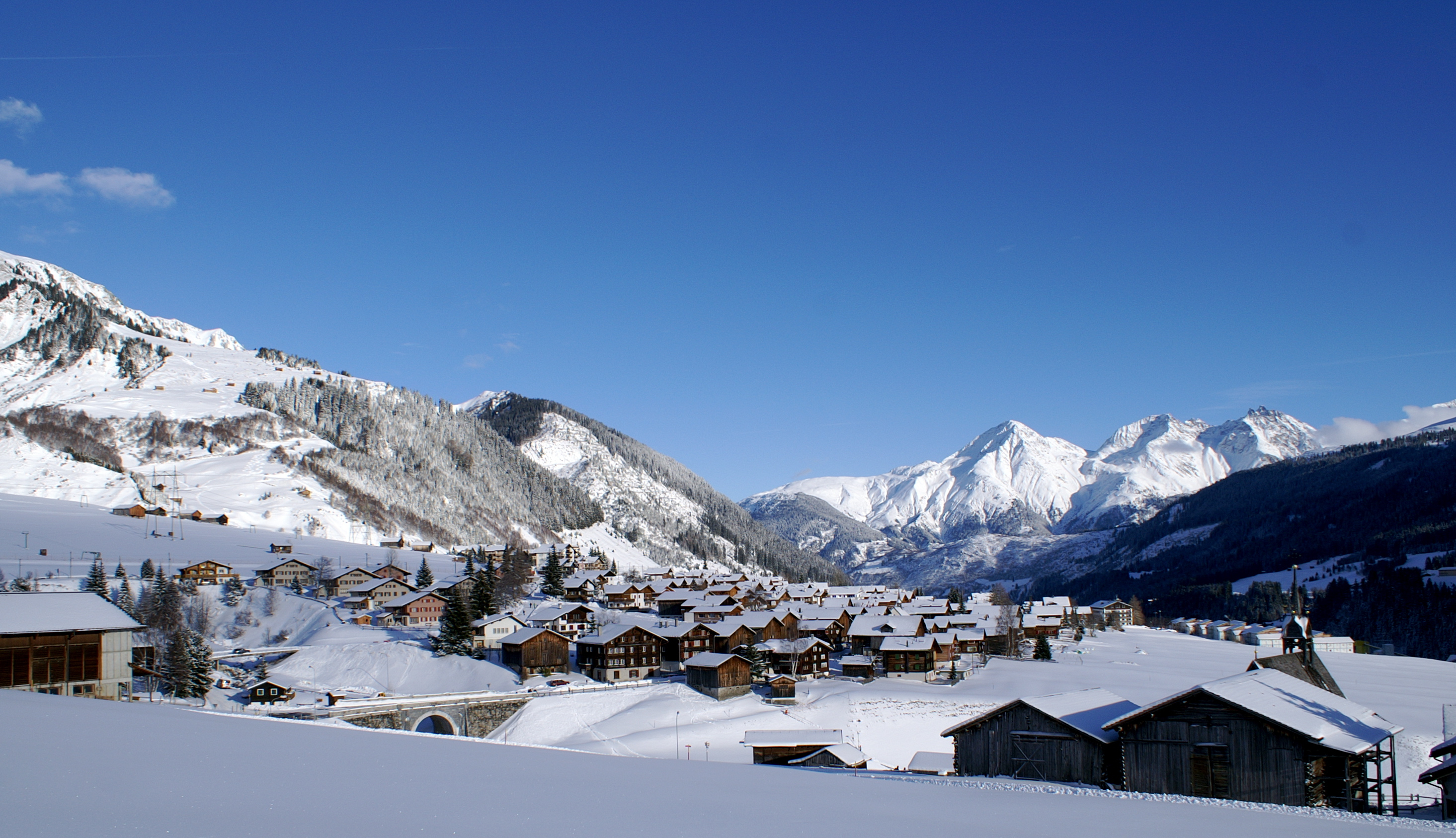 Rueras, Graubünden